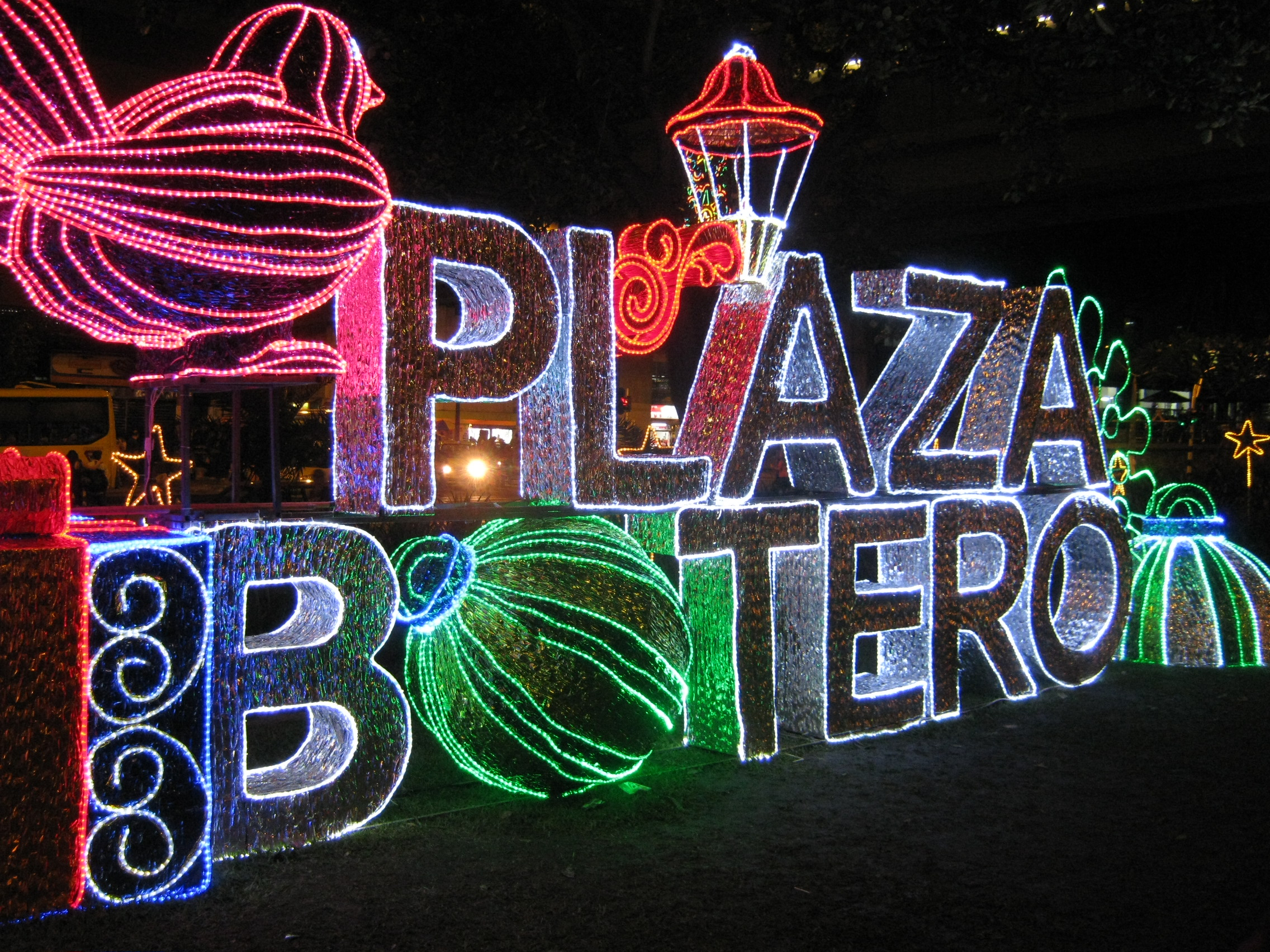 Alumbrado navideño de Medellín, Plaza Botero de 2011. Colombia.